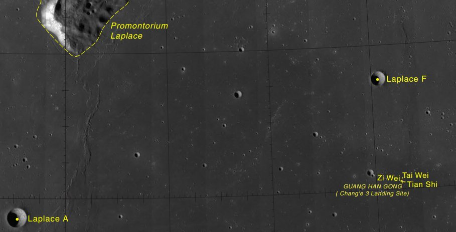 Guang Han Gong, lugar de aterrizaje de la nave Chang'e 3. (Imagen LRO)